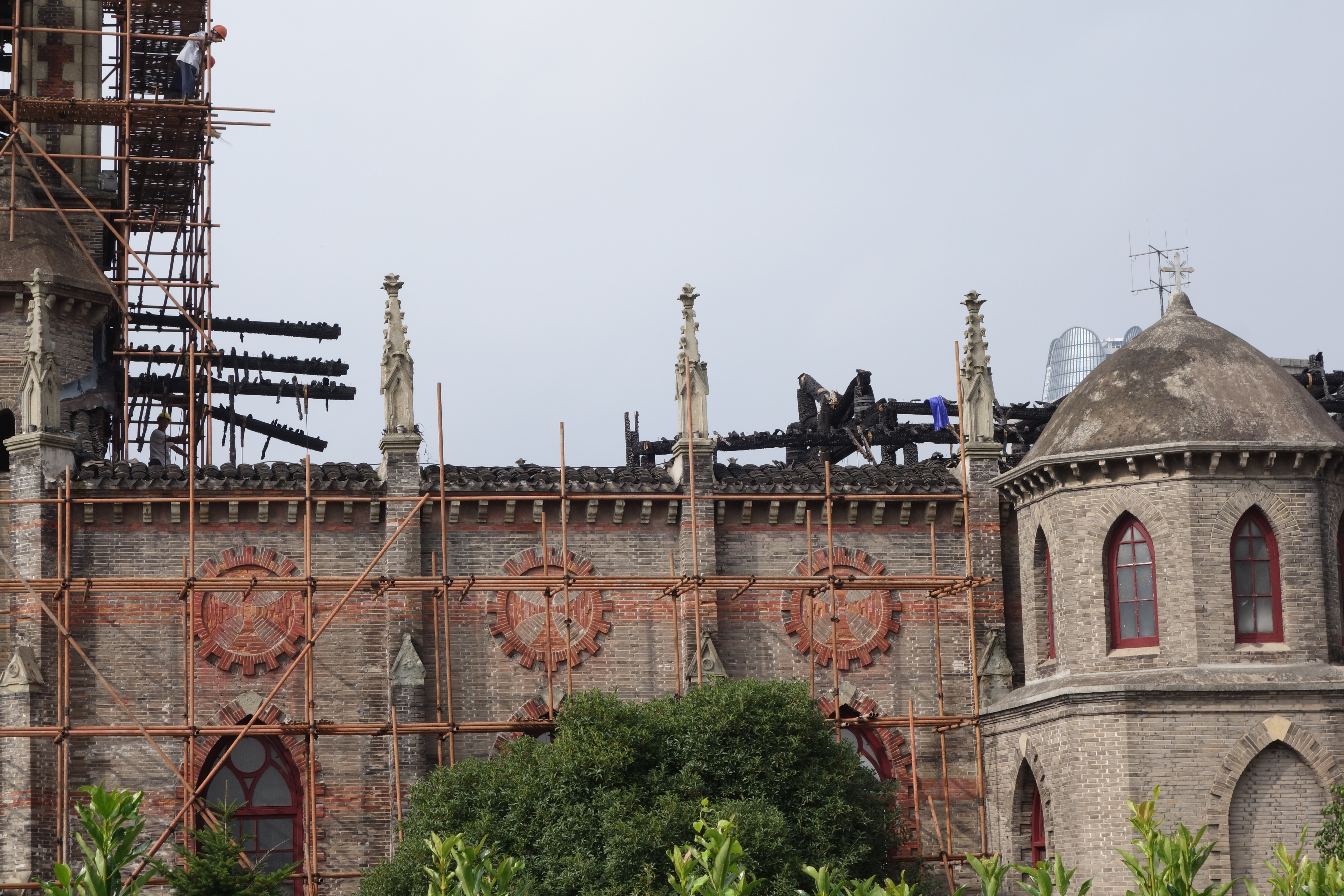 火灾后的江北天主堂